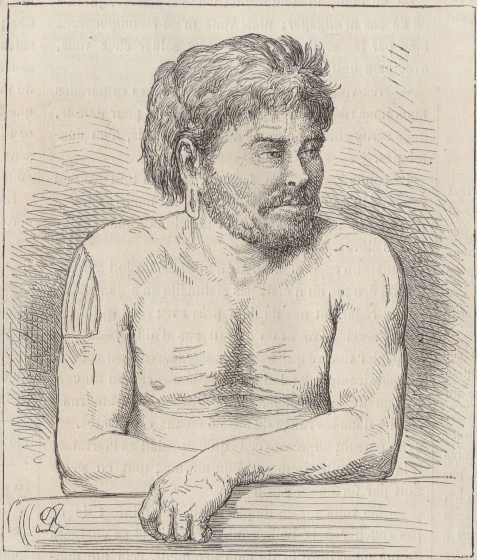 "Pierre Pelletier, le marin qui a vécu dix-sept ans chez les sauvages d'Australie".